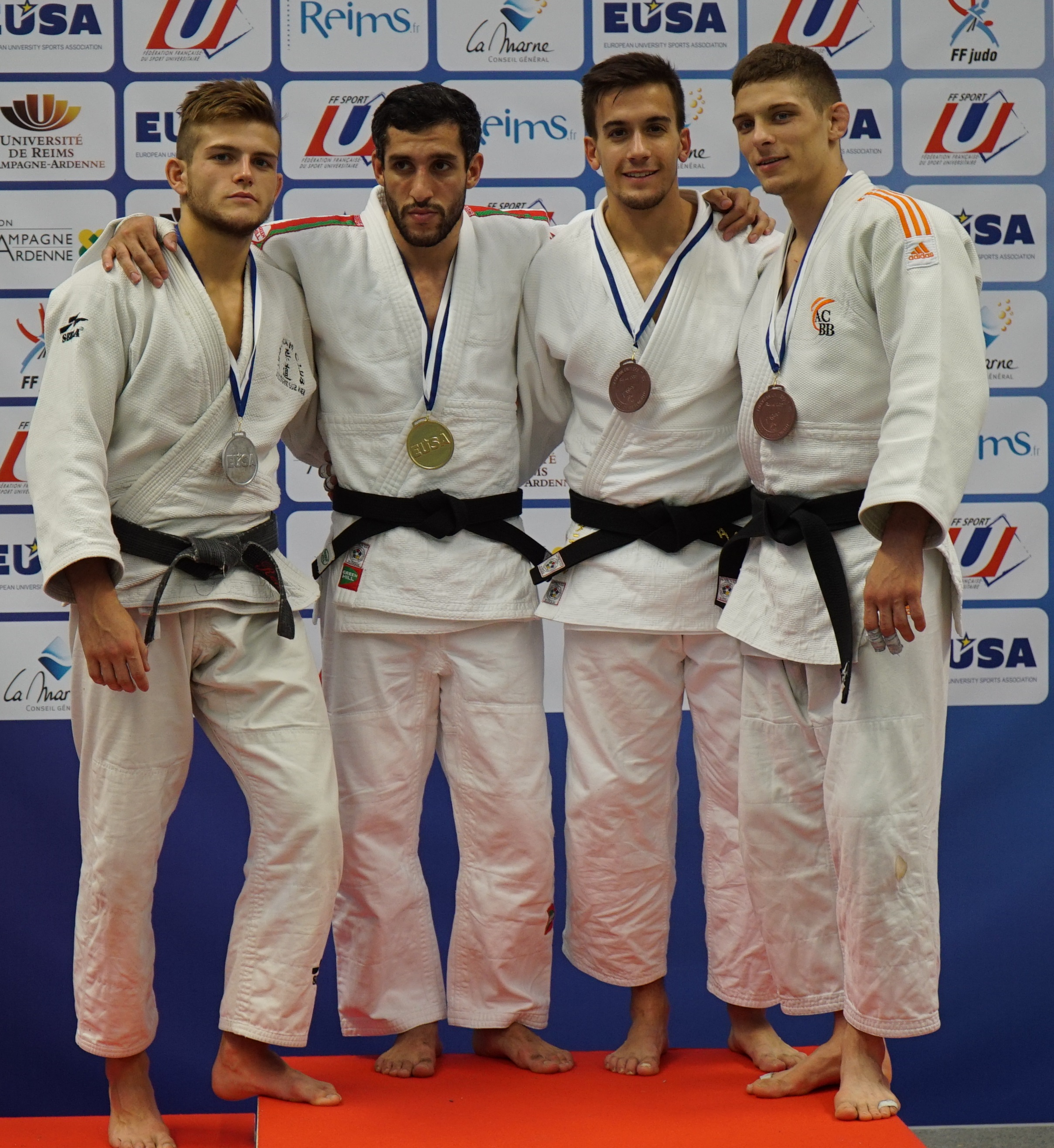 lors des compétitions de 2015.